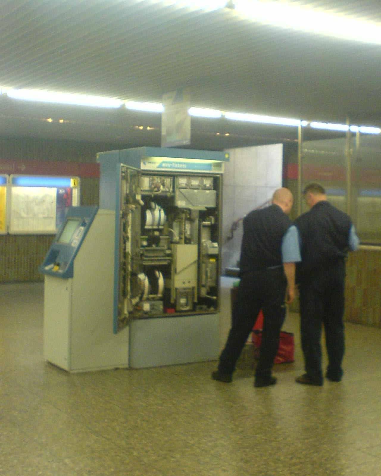 Befüllung bzw. Entleerung eines MVV-Fahrkartenautomatens, München